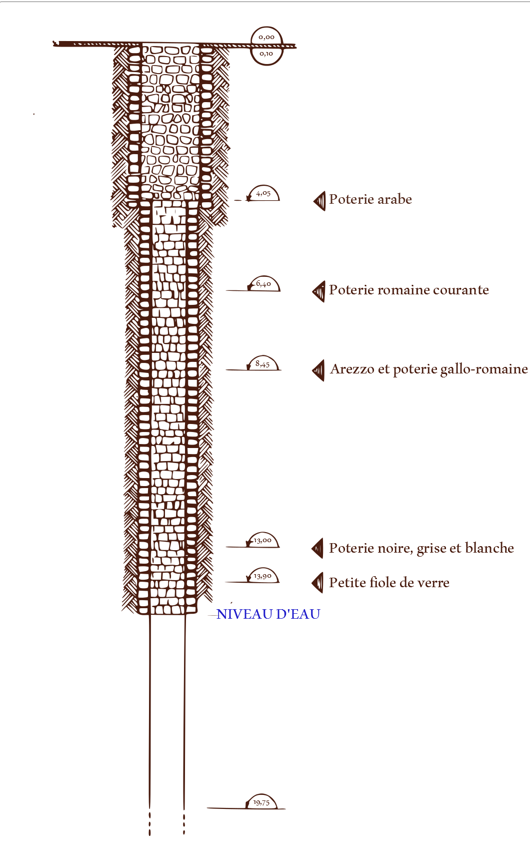 Puit antique du quartier de la marine (Alger - basse Casbah) selon M.Le Glay [1] Objets retrouvés selon la profondeur (en mètres).